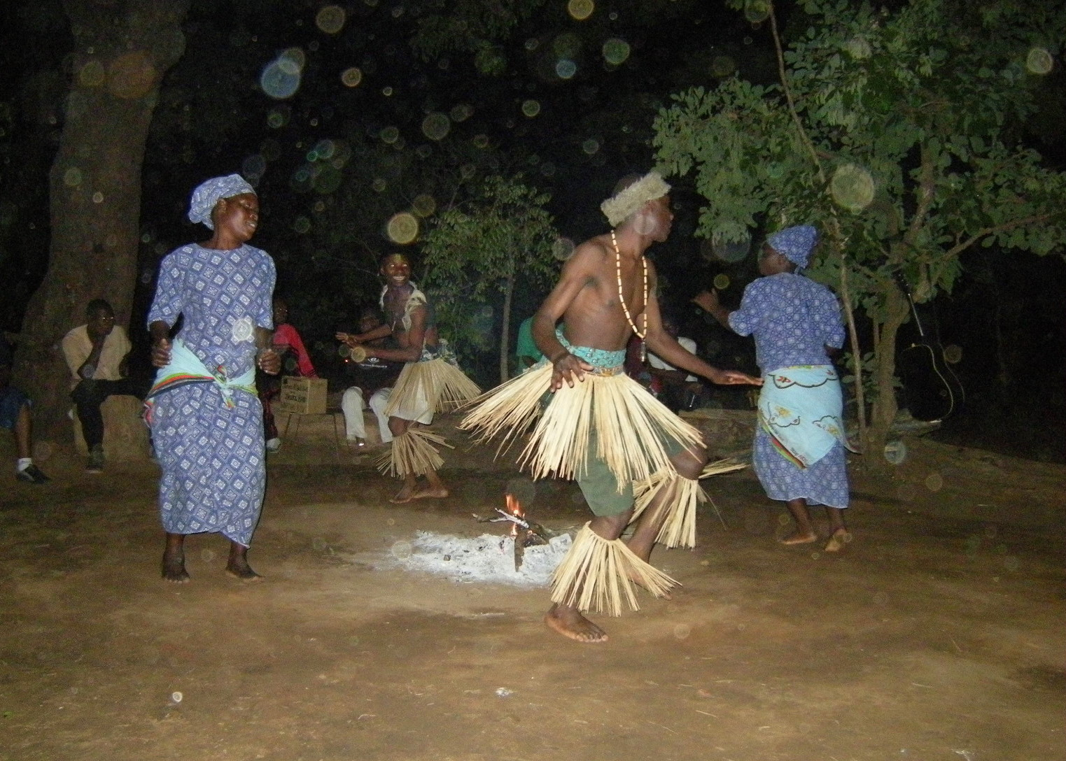 Kumbali Village - uma vila (tribo) para atividades culturais nos arredores de Lilongwe, capital do Malawi